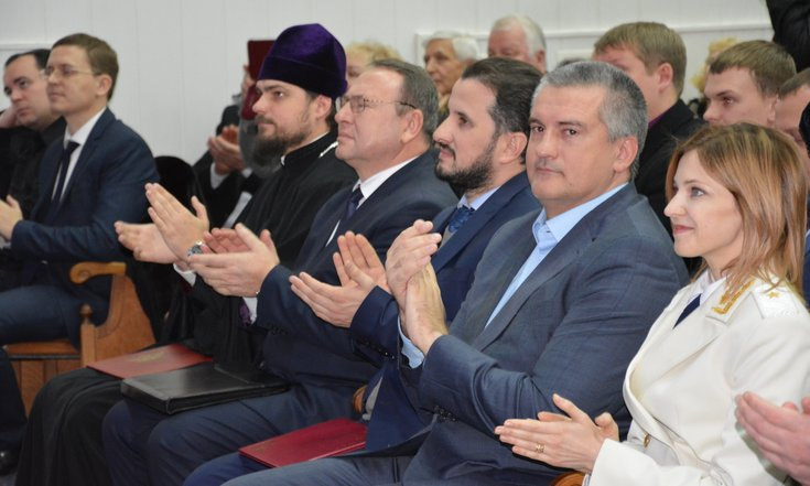 Глава Республики Крым Сергей Аксёнов и депутат Госдумы РФ Наталья Поклонская